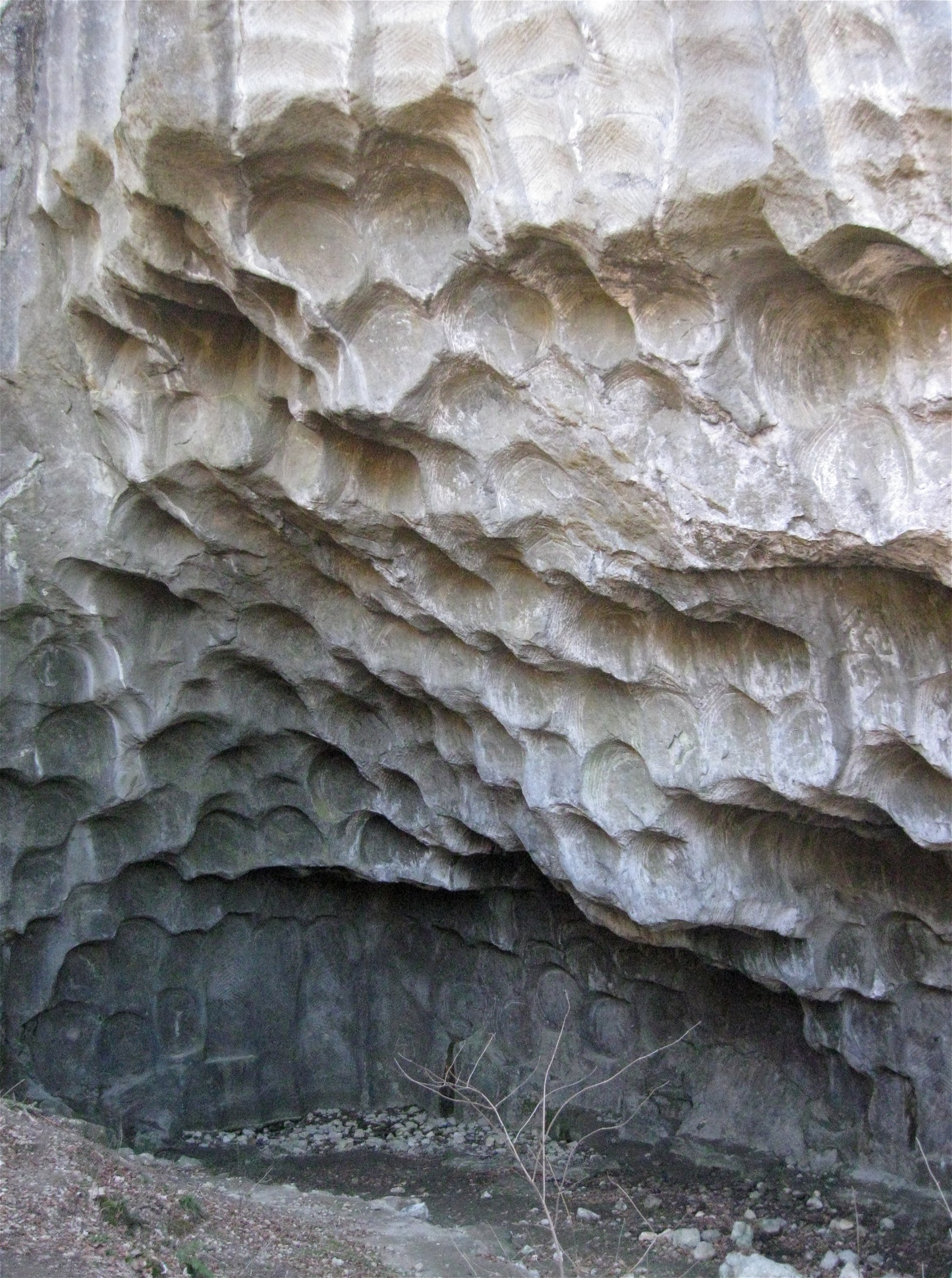 Hinterhör, Neubeuern, Mühlsteinbruch; ca. 10 m breite Höhle, in die Felswand eingearbeitet, mit Kreisspuren abgemeißelter Mühlsteine